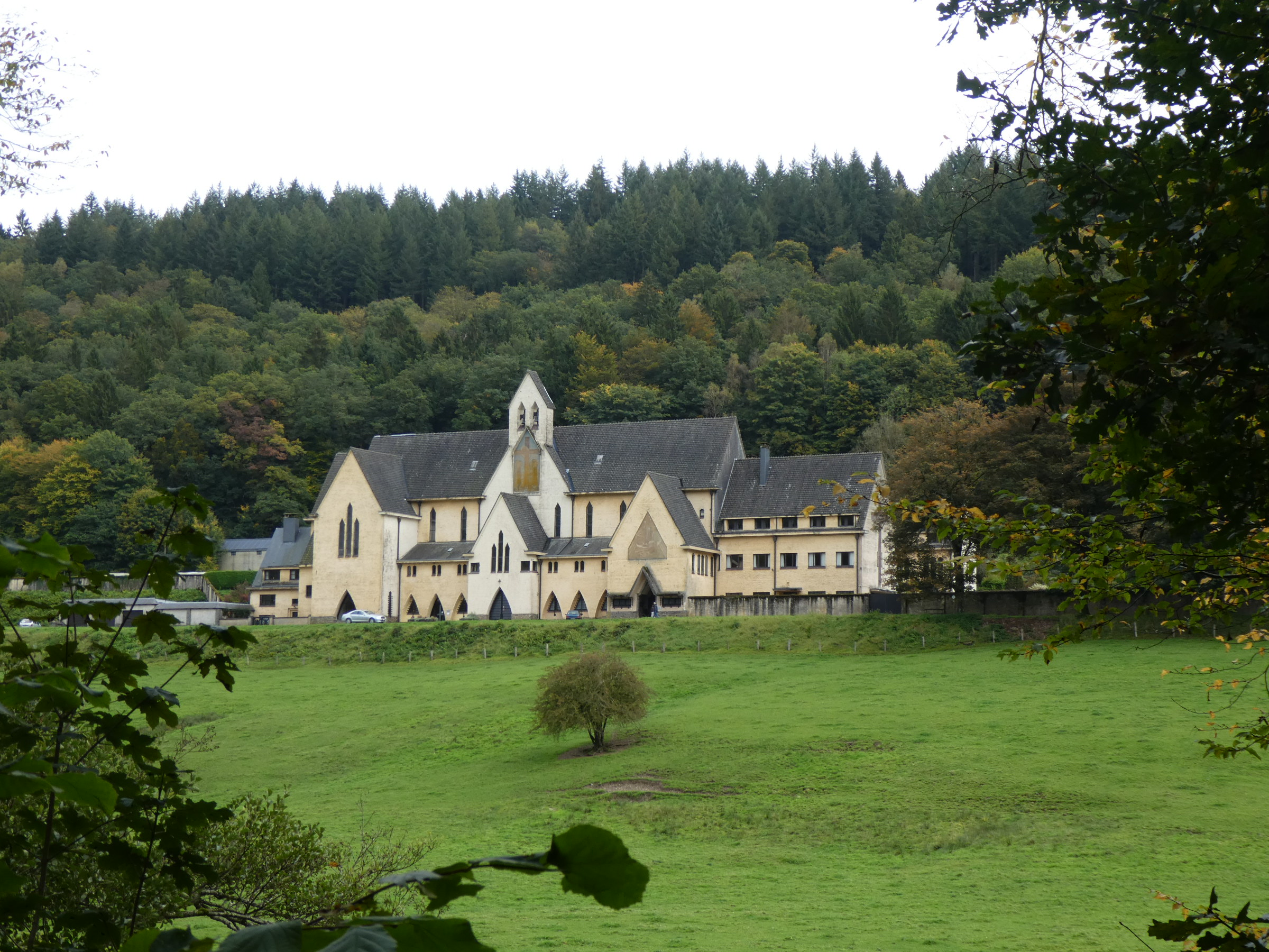 Abbaye Notre-Dame de Clairefontaine (à coté de Bouillon, Belgique)